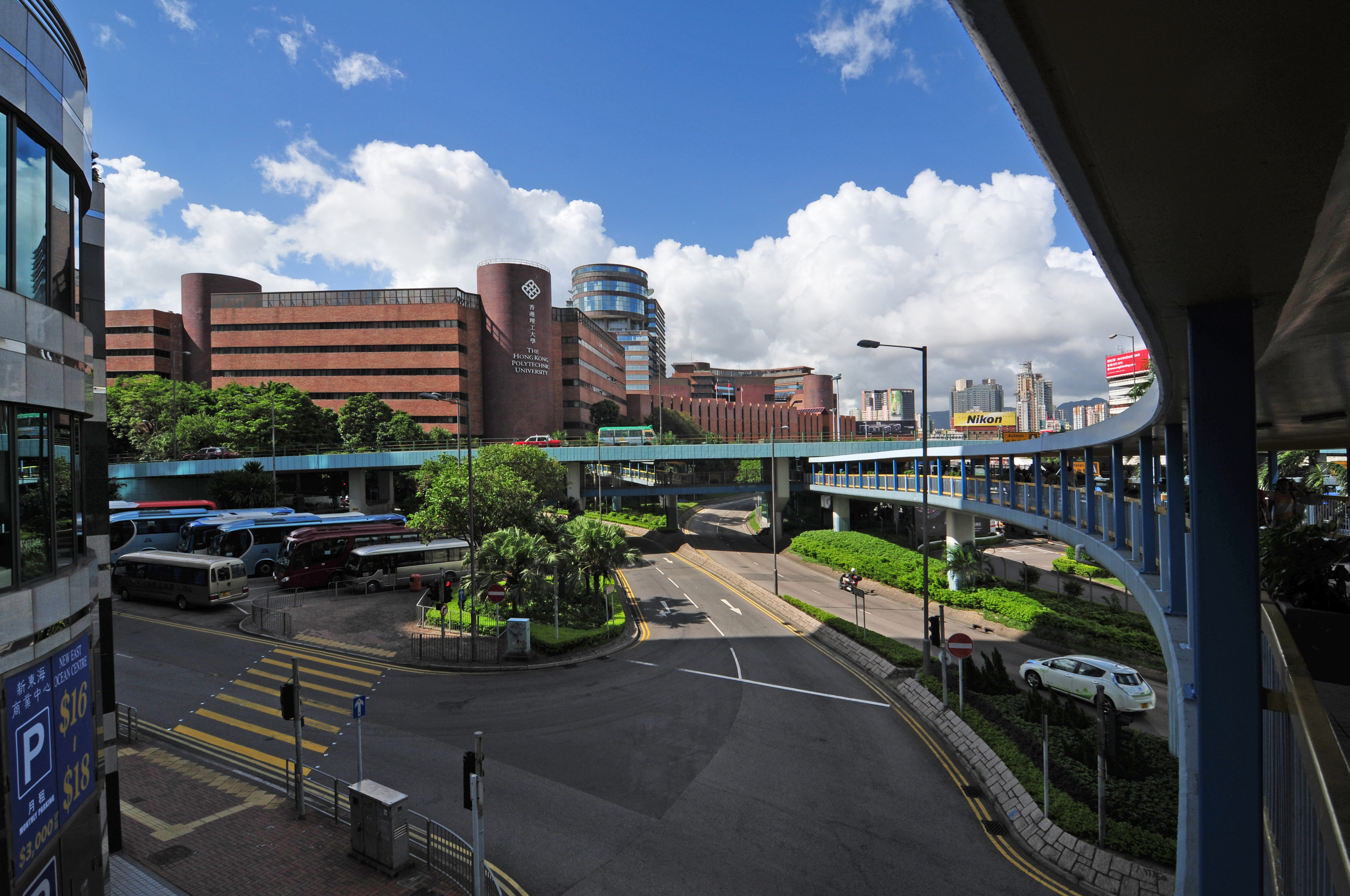 Wikimania 2013 Hongkong